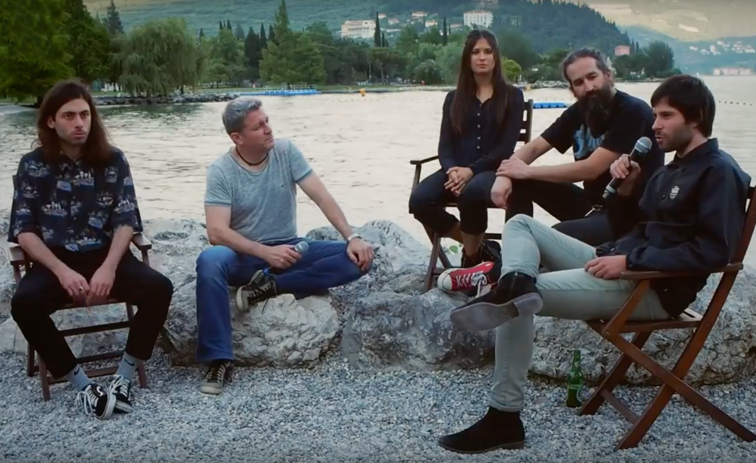 interview